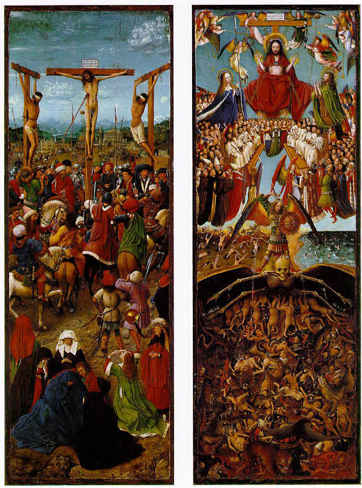 Crucifixión y Juicio final( Oleo sobre tabla 2x 56,5x19,7cm)